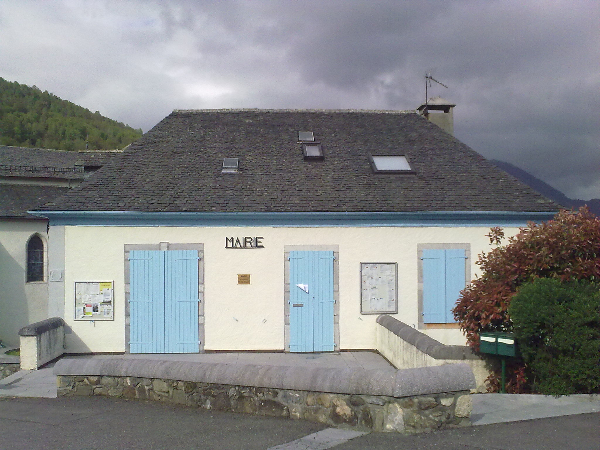 Bilhères, France